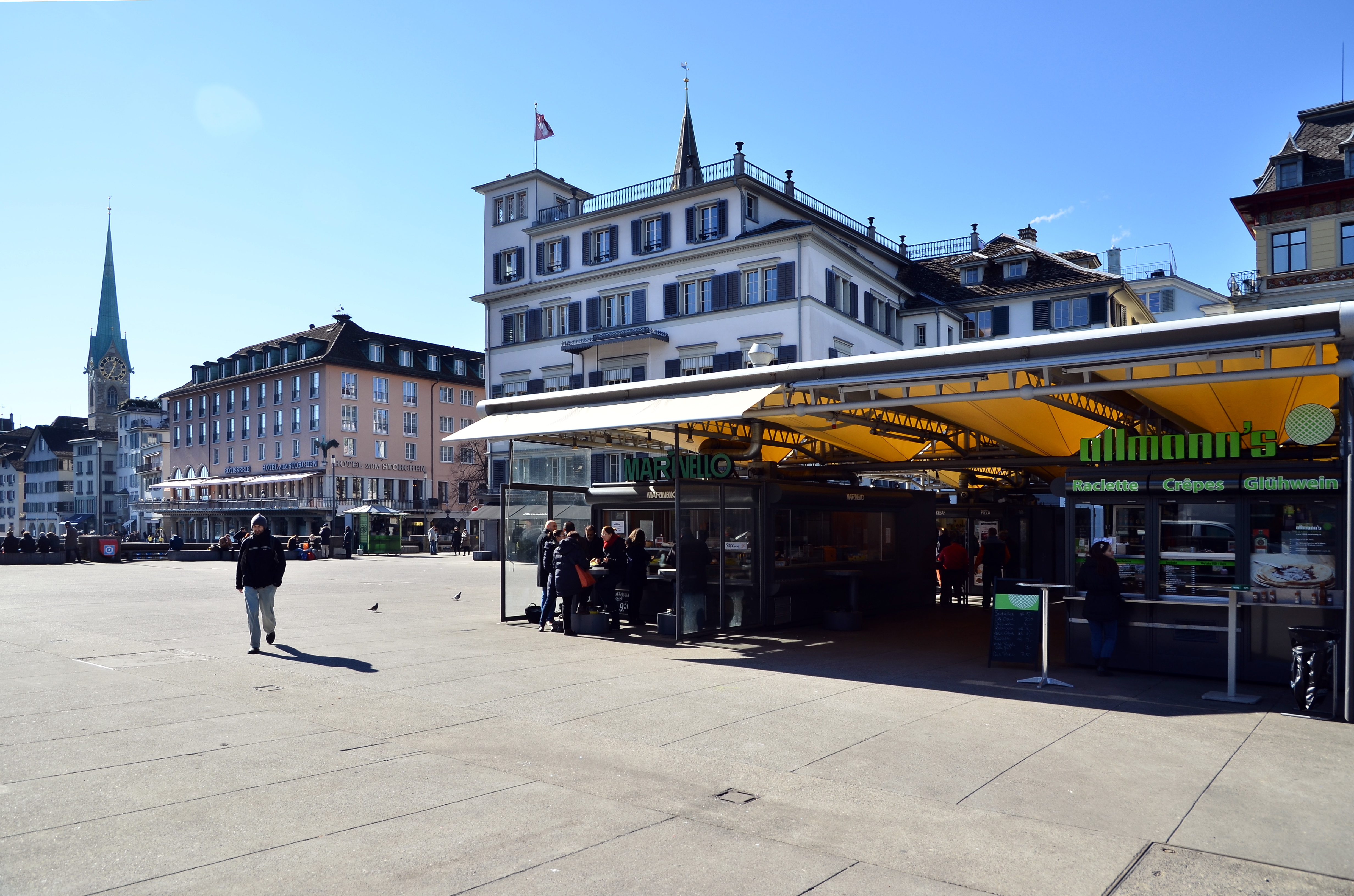 Rathausbrücke (Gmüesbrugg) and Weinplatz in Zürich (Switzerland) as seen from Limmatquai